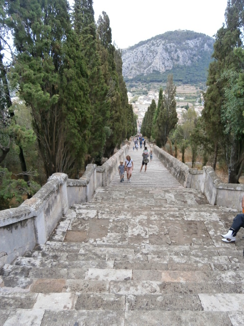 Treppe in Pollenca